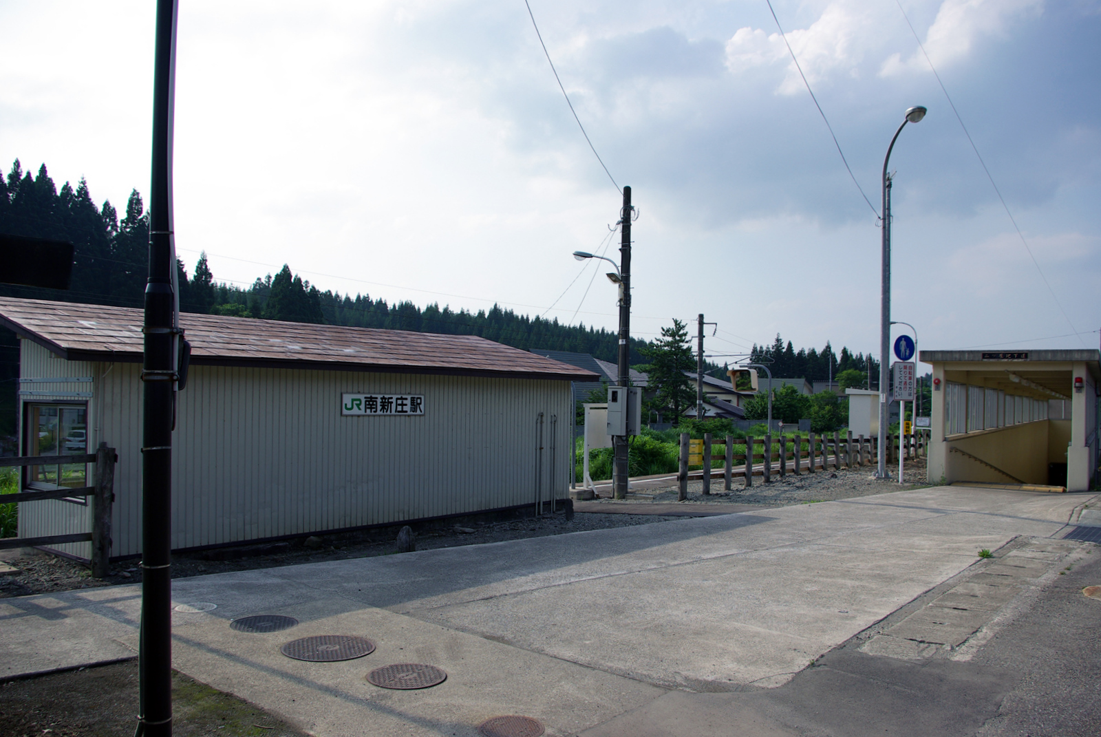 JR陸羽東線南新庄駅